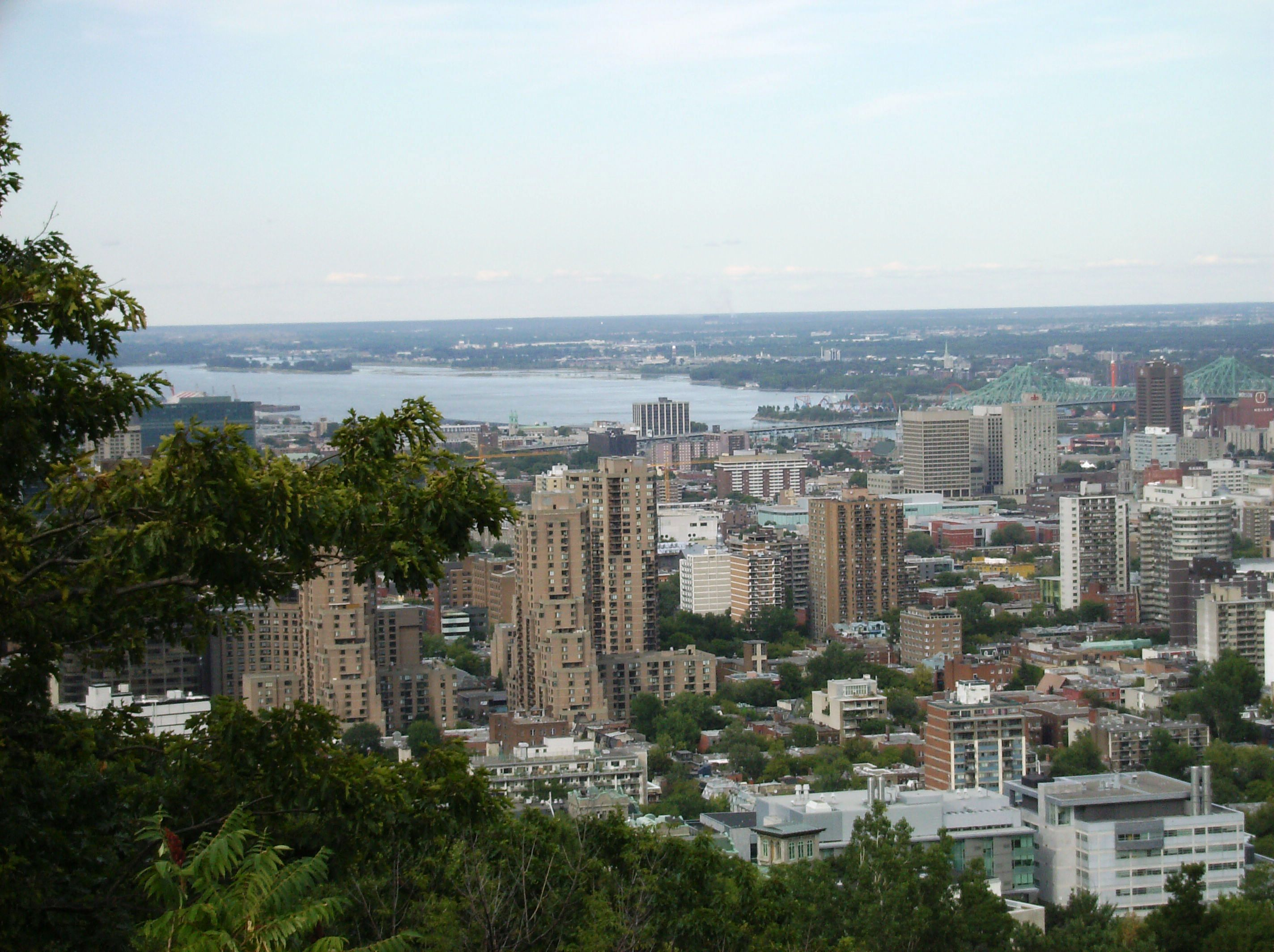 Montreal vu depuis le Mont Royal